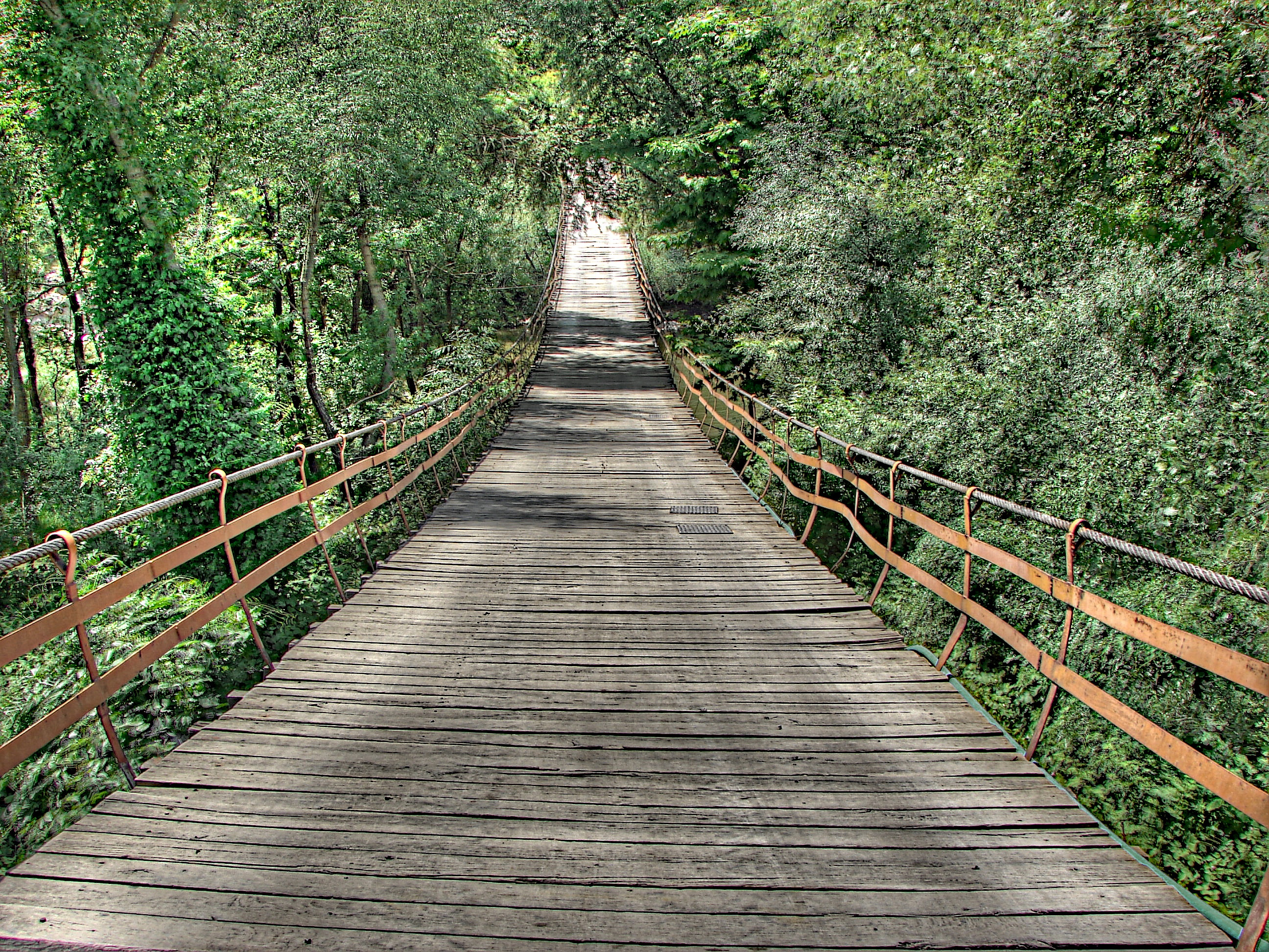 Bridge HDR